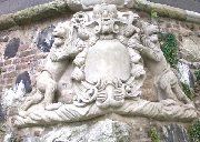 Kartusche an der Mauerwand einer Face der ehemaligen Stadtbefestigung.